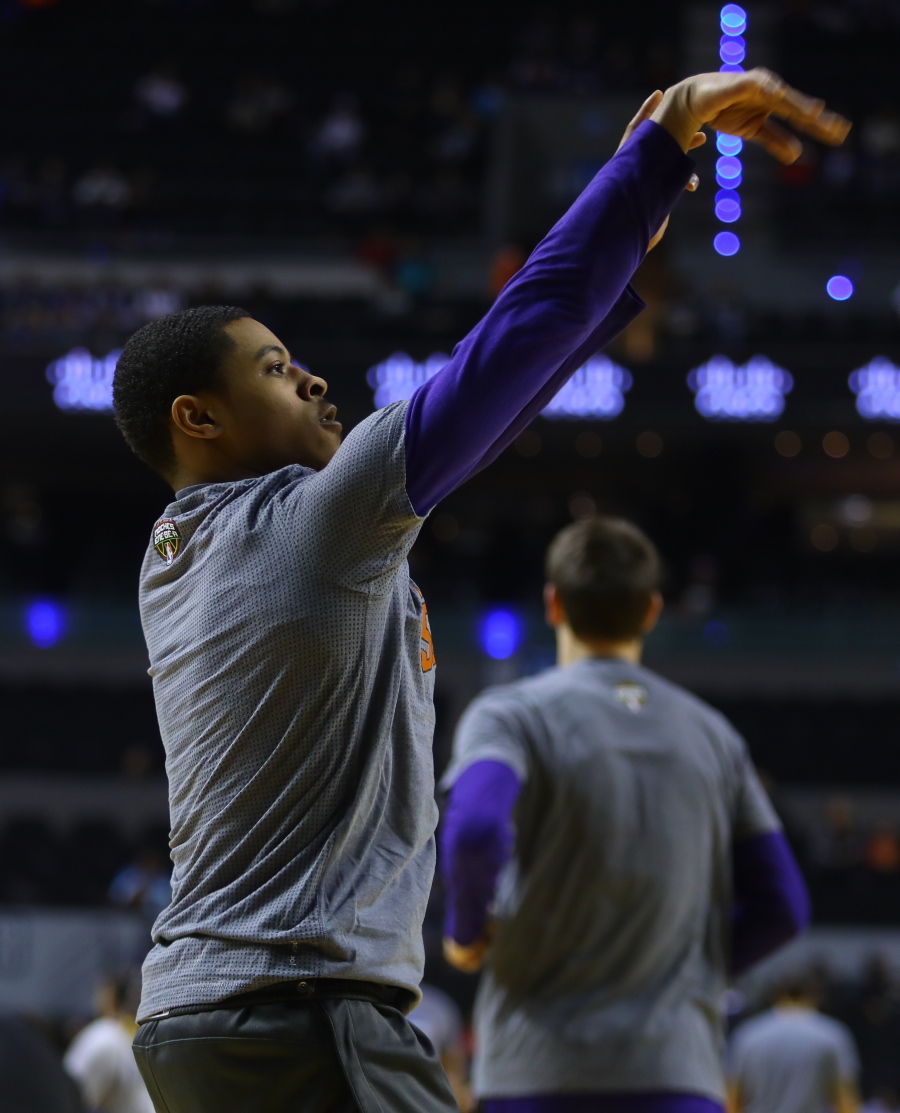 Partido NBA